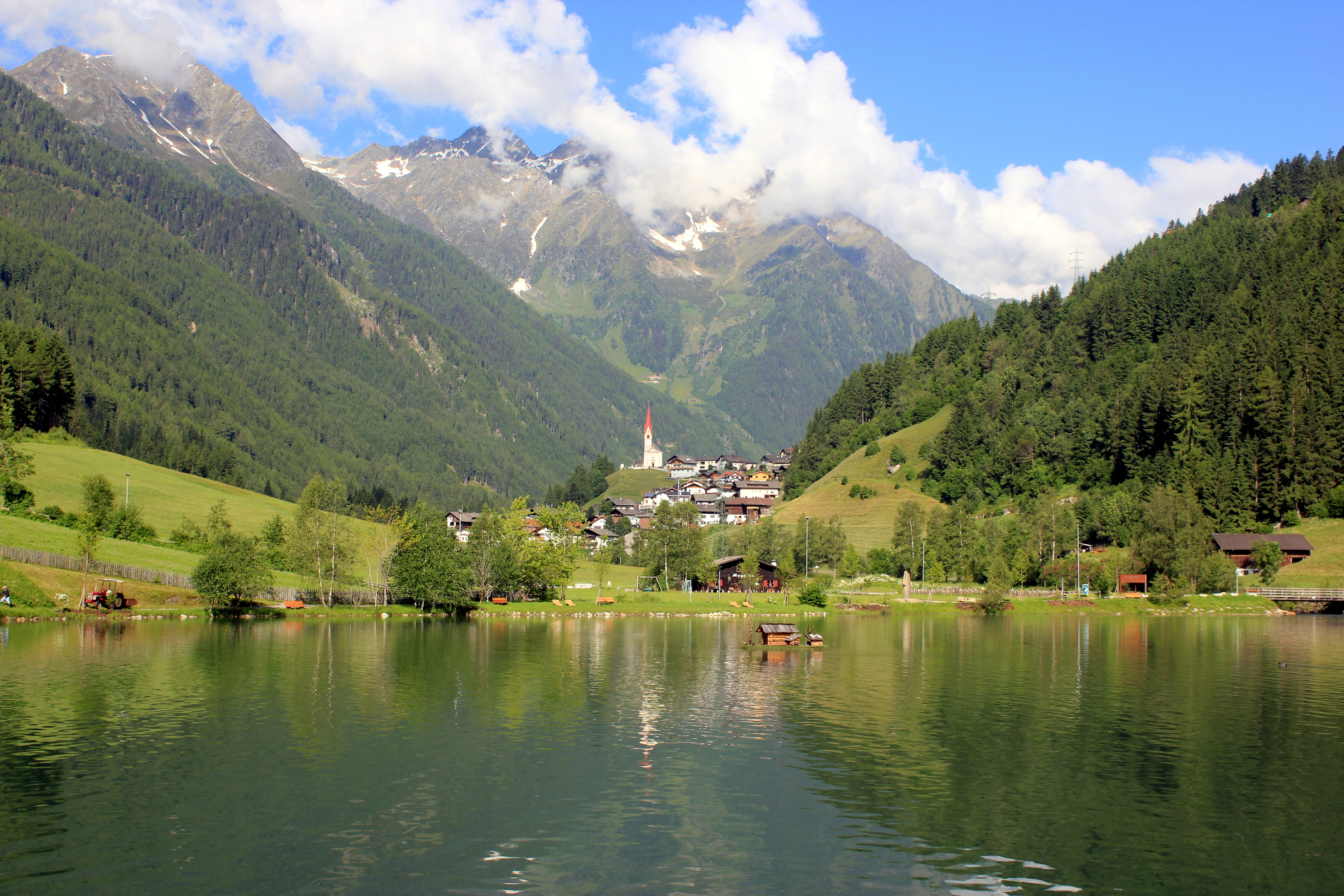 Hornjoserbsce: Napohlad wjeski Mühlwald w Južnym Tirolu z wuchoda.